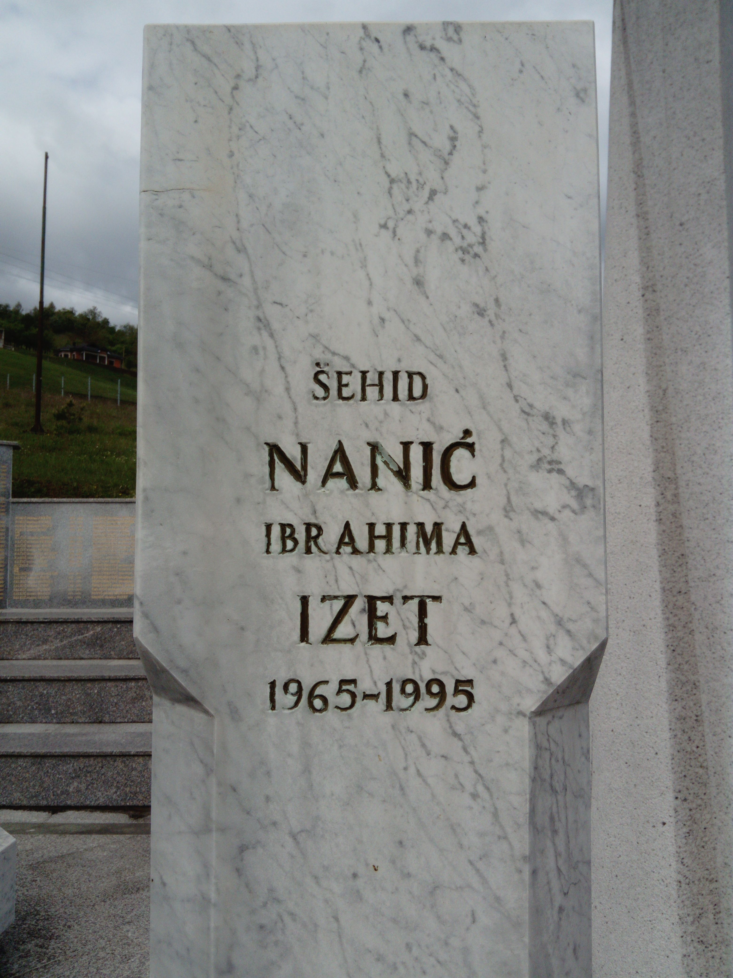 Turbe generala Izeta Nanića i šehida 505. Viteške brigade.